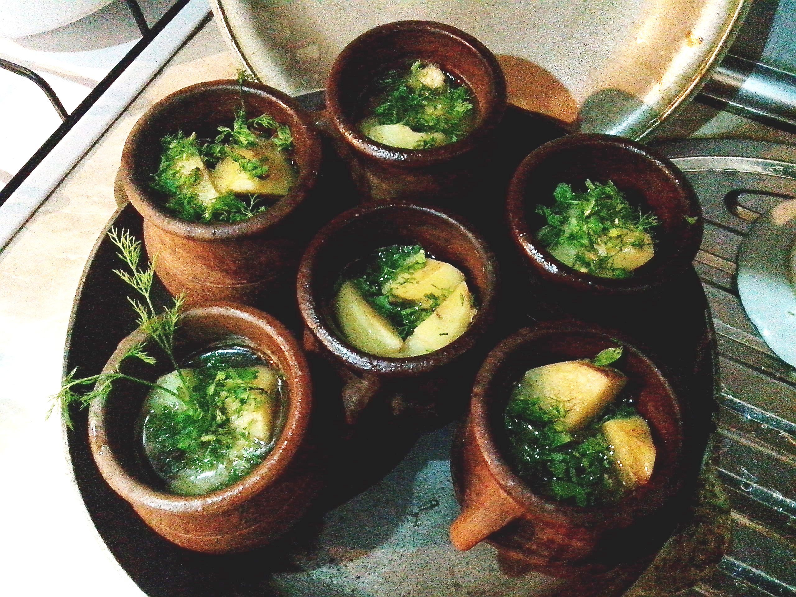 Azərbaycanın milli yeməyi, ev şəraitində hazırlanmış Piti